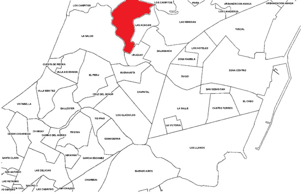 Localización del barrio